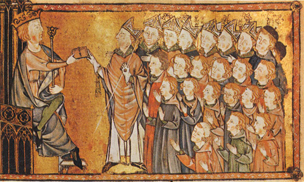 Miniature représentant le roi de France, assis sur son trône, portant son sceptre et sa couronne, remettant le coutumier de Normandie à l'archevêque de Rouen accompagné par ses six suffragants et par des représentants de la province. Le Grand Coutumier de Normandie (Summa de legibus Normannie in curia laicali)